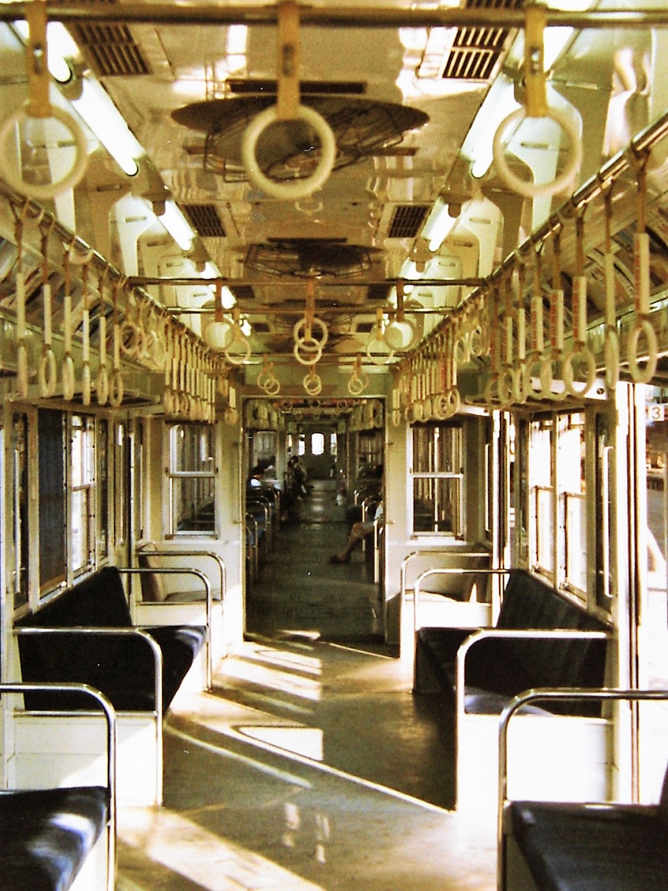 小田急電鉄クハ2478車内 試作冷房改造車 1982年撮影